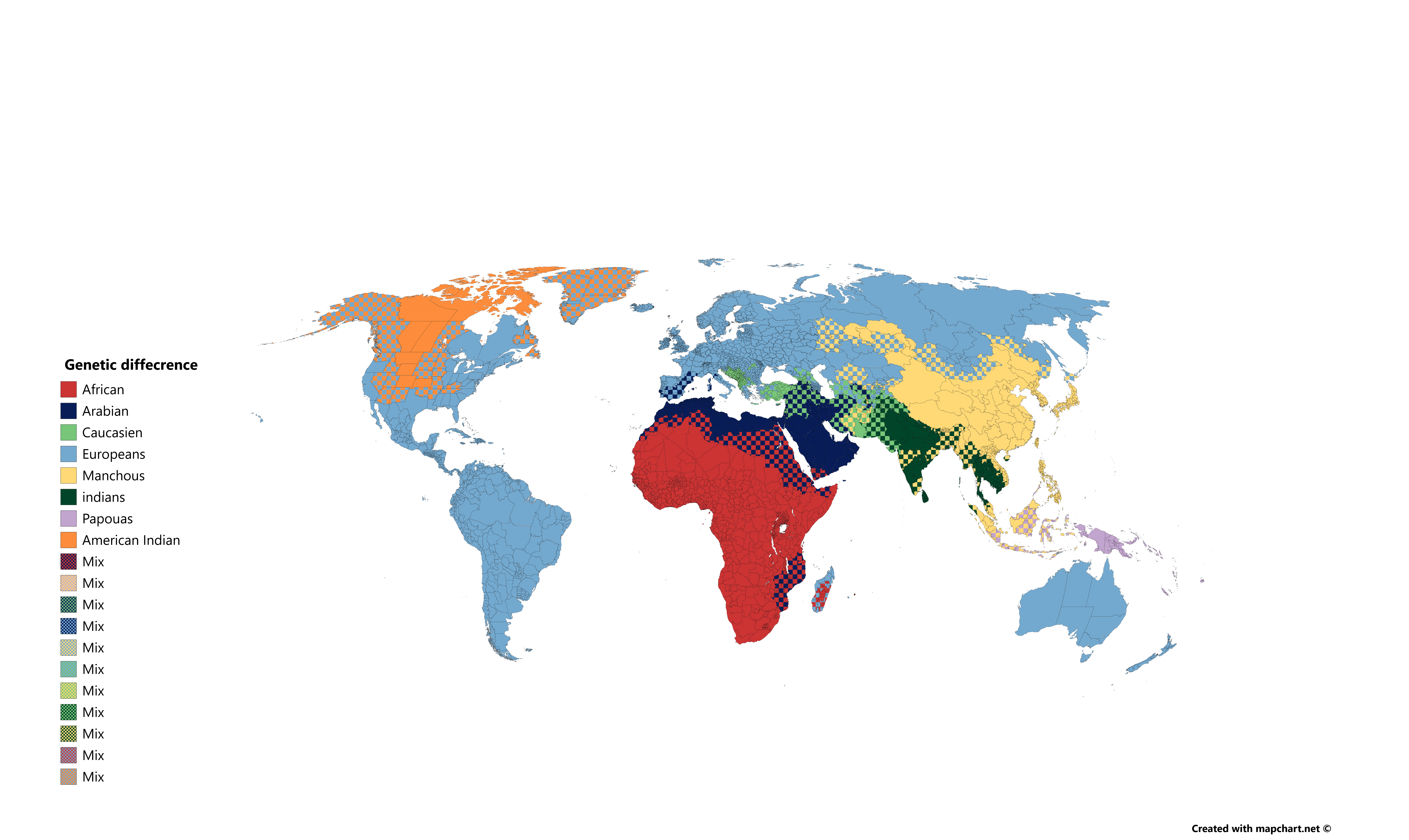 Genetic Difference